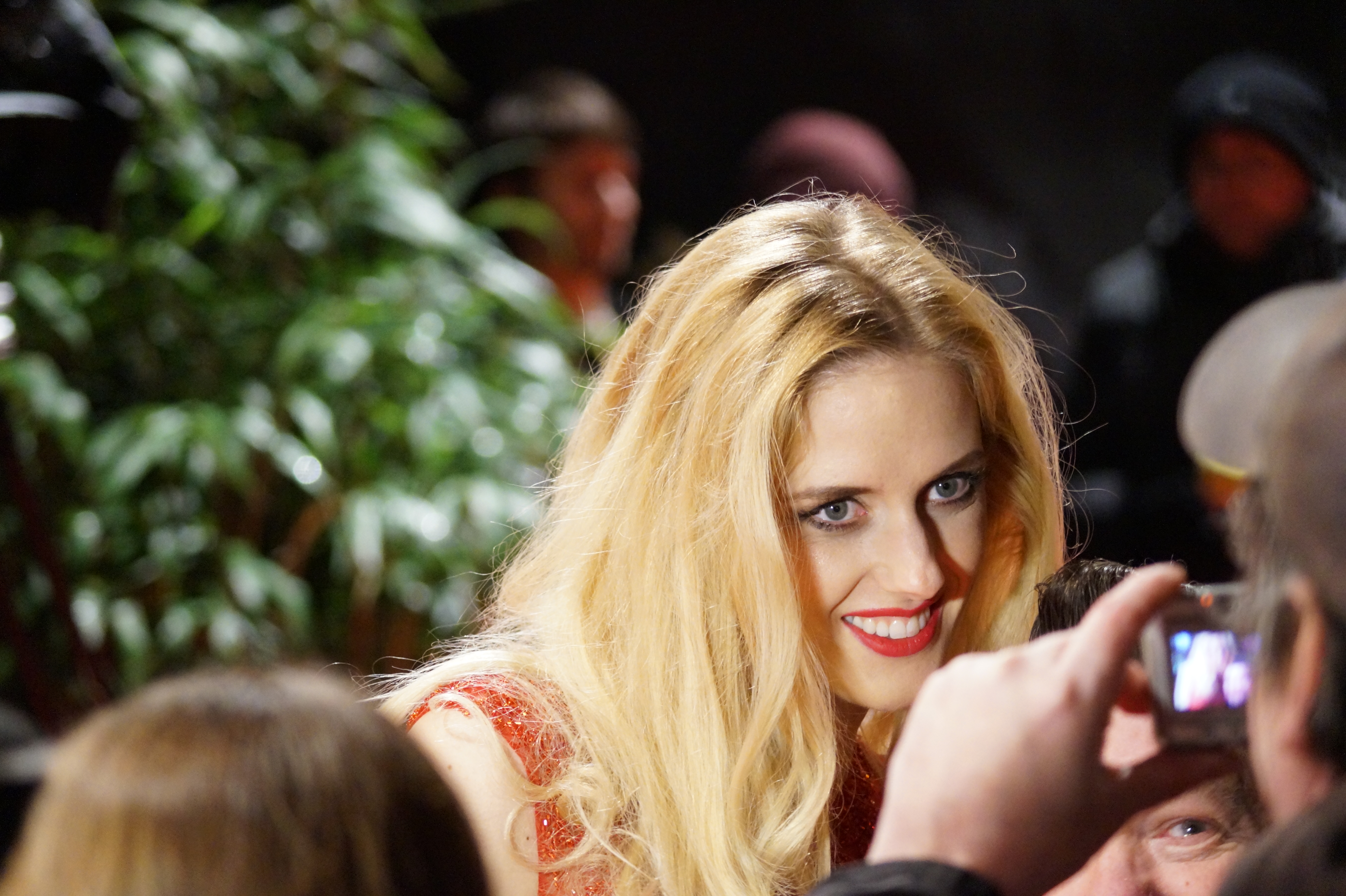 "Lambertz Monday Night 2015" im "Alten Wartesaal" in Köln, am 02.02.2015.